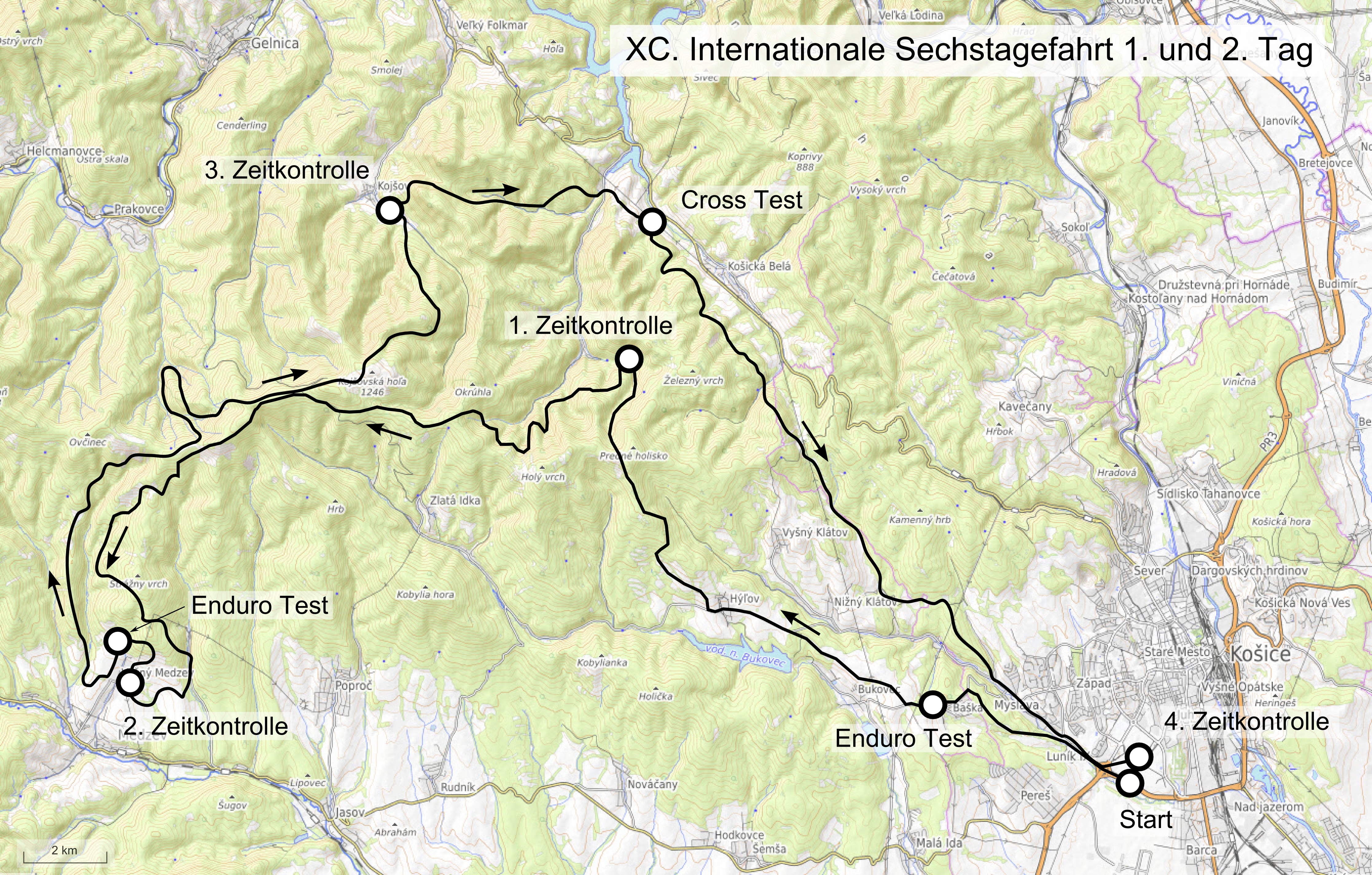 Karte der 90. Internationale Sechstagefahrt, Route des 1. und 2. Tages